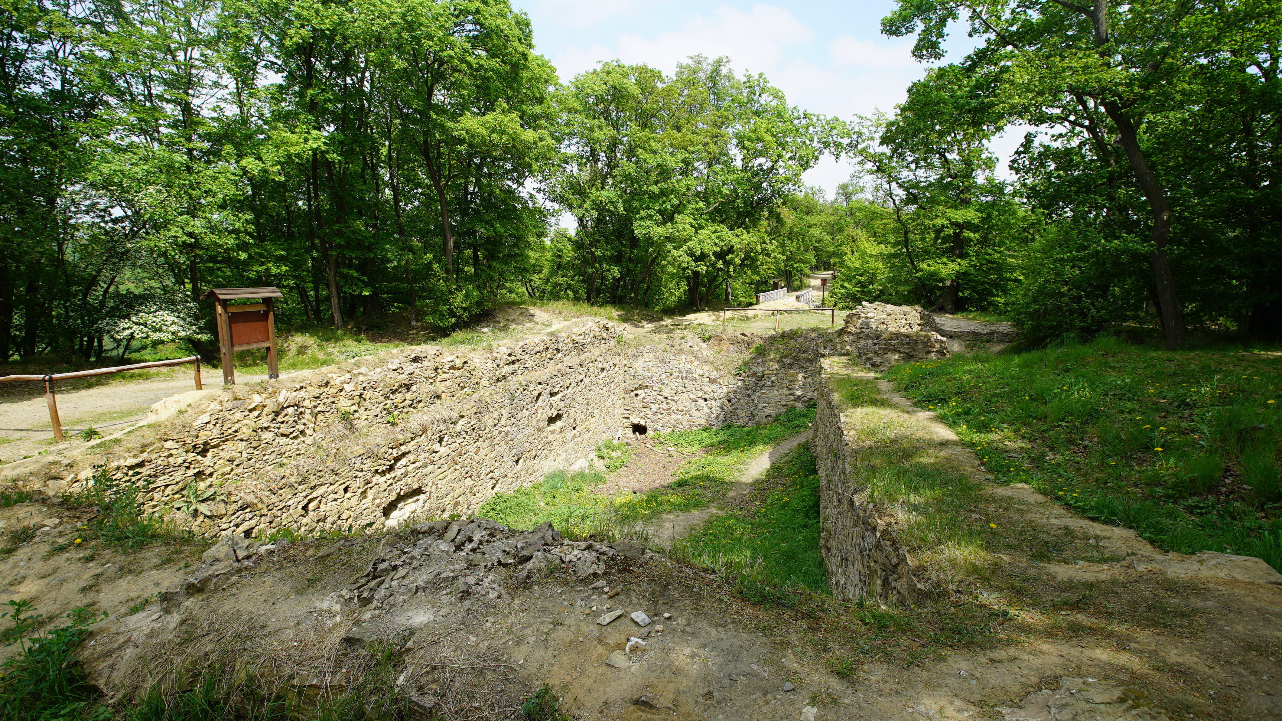 Zřícenina gotického hradu Nový hrádek krále Václava IV., zdroj: magazín Krčák žije